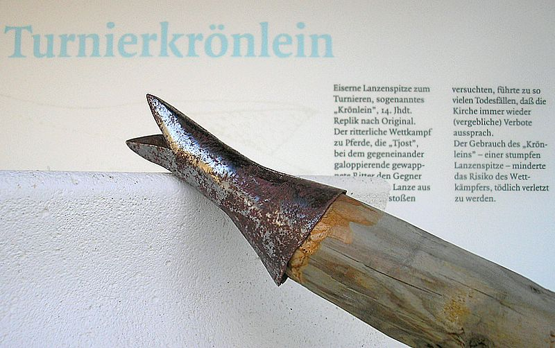 Burg Lichtenstein, Ruine der Nordburg (Gemeinde Pfarrweisach, Landkreis Haßberge, Unterfranken). Turnierkrönlein (Nachbildung). Eigene Aufnahme, Aug. 2007 / Lichtenstein castle (Ruin of the northern castle) near Pfarrweisach (Lower Franconia, Germany). "Crown" of a medieval jousting lance (Replica). Own photo, Aug. 2007